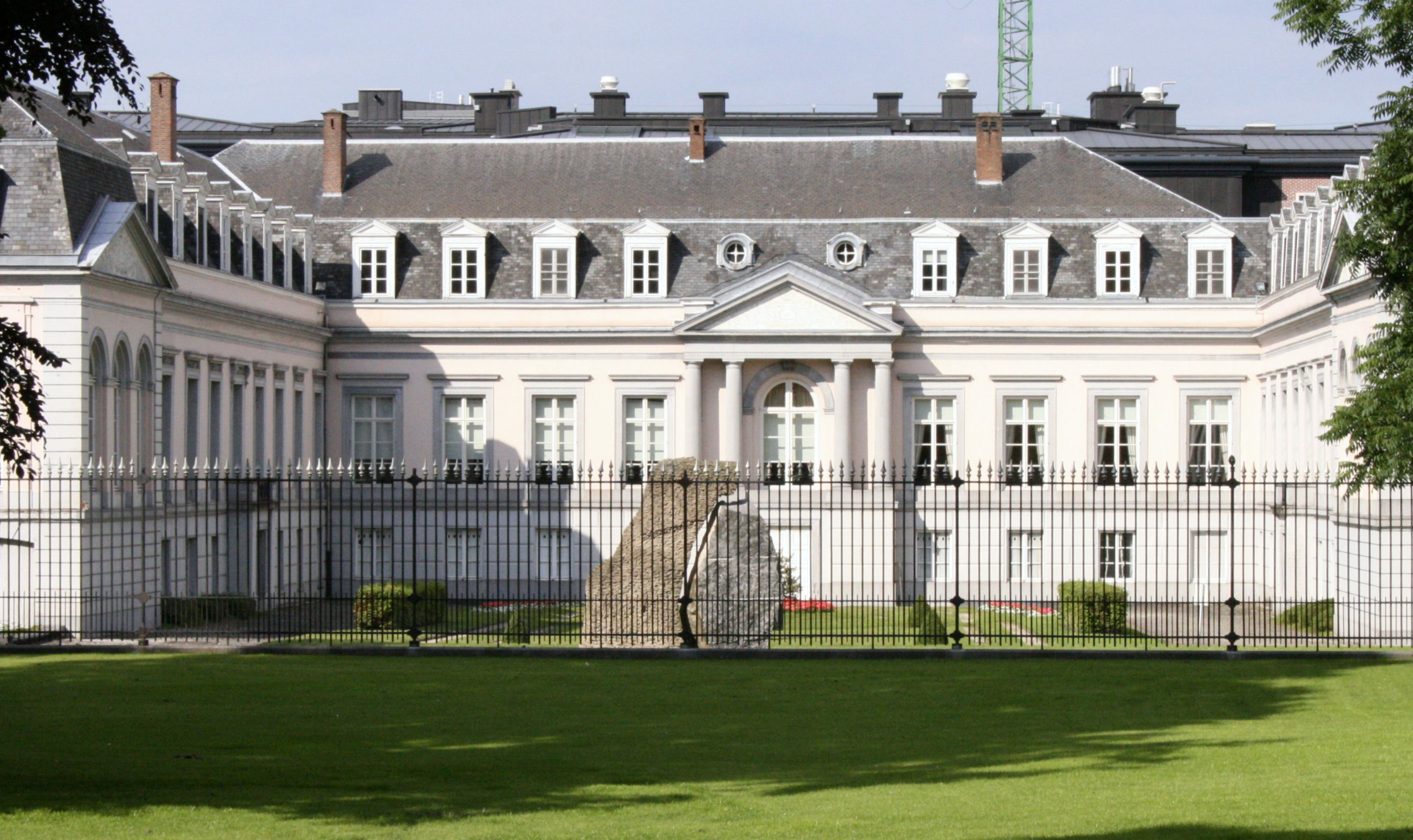 Parc d'Egmont, Bruxelles (Belgique). Vue du Palais d'Egmont depuis le parc